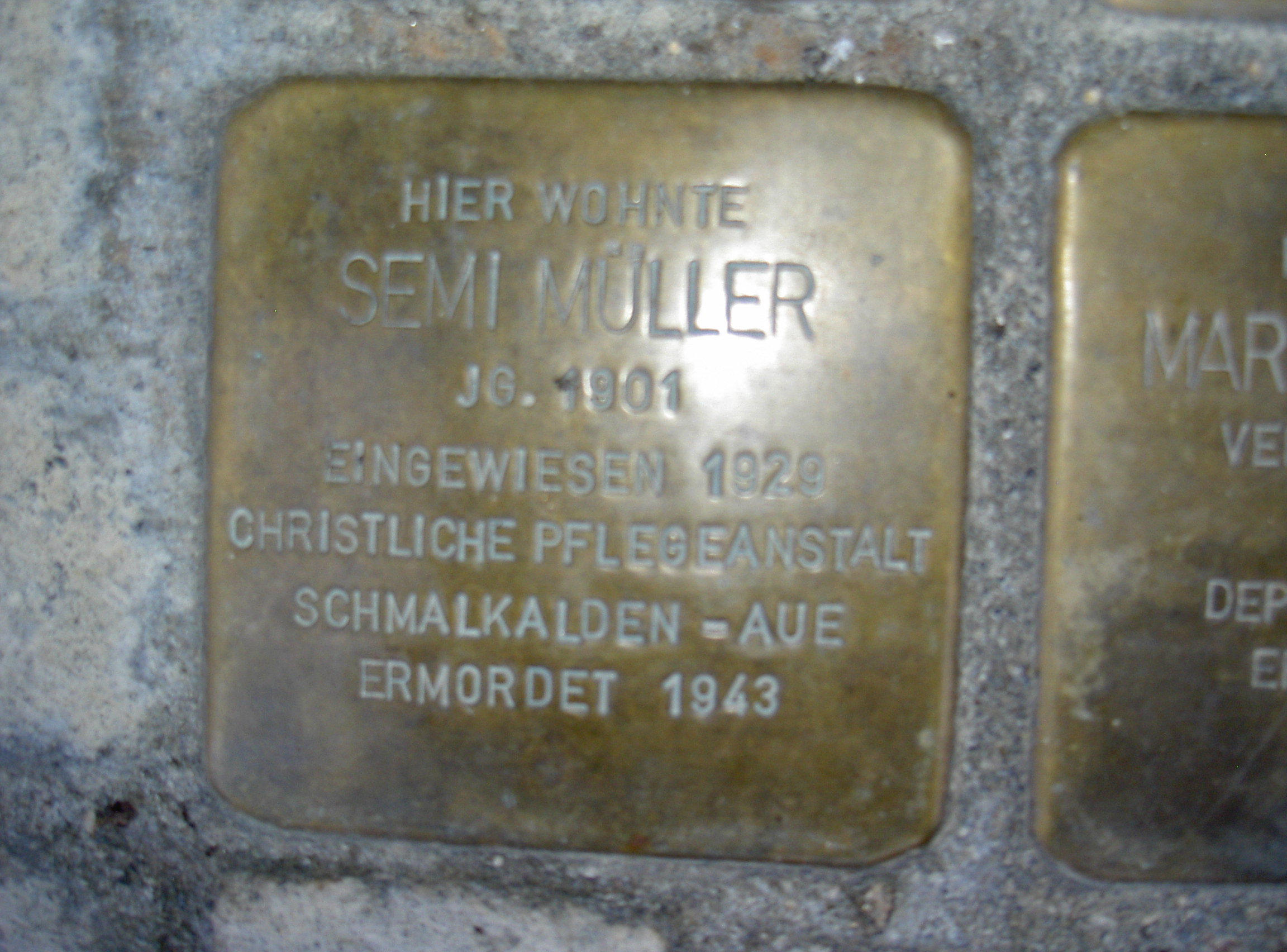 Stolperstein in Themar Müller Semi